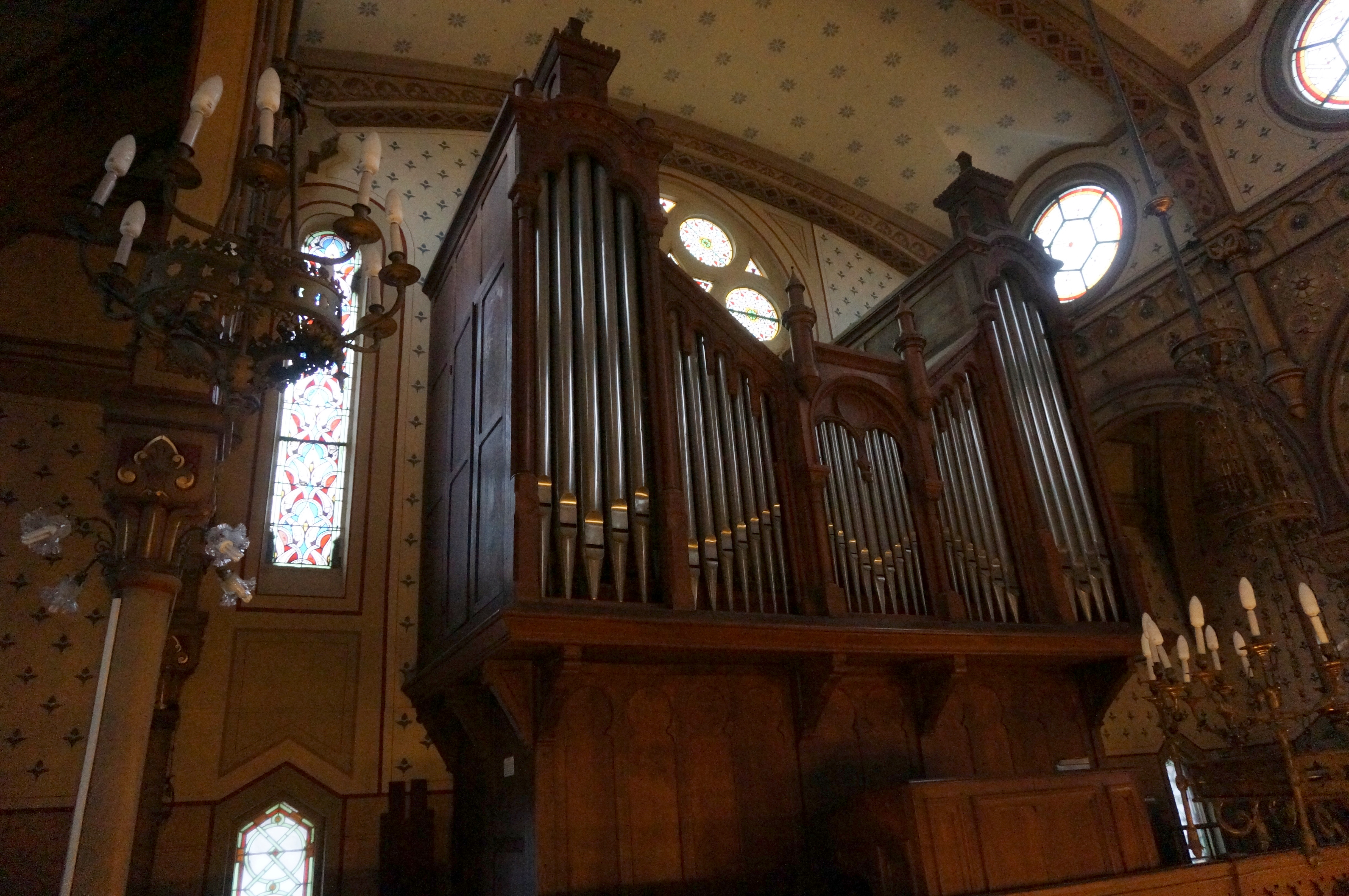 intérieur de la Synagogue de Reims.